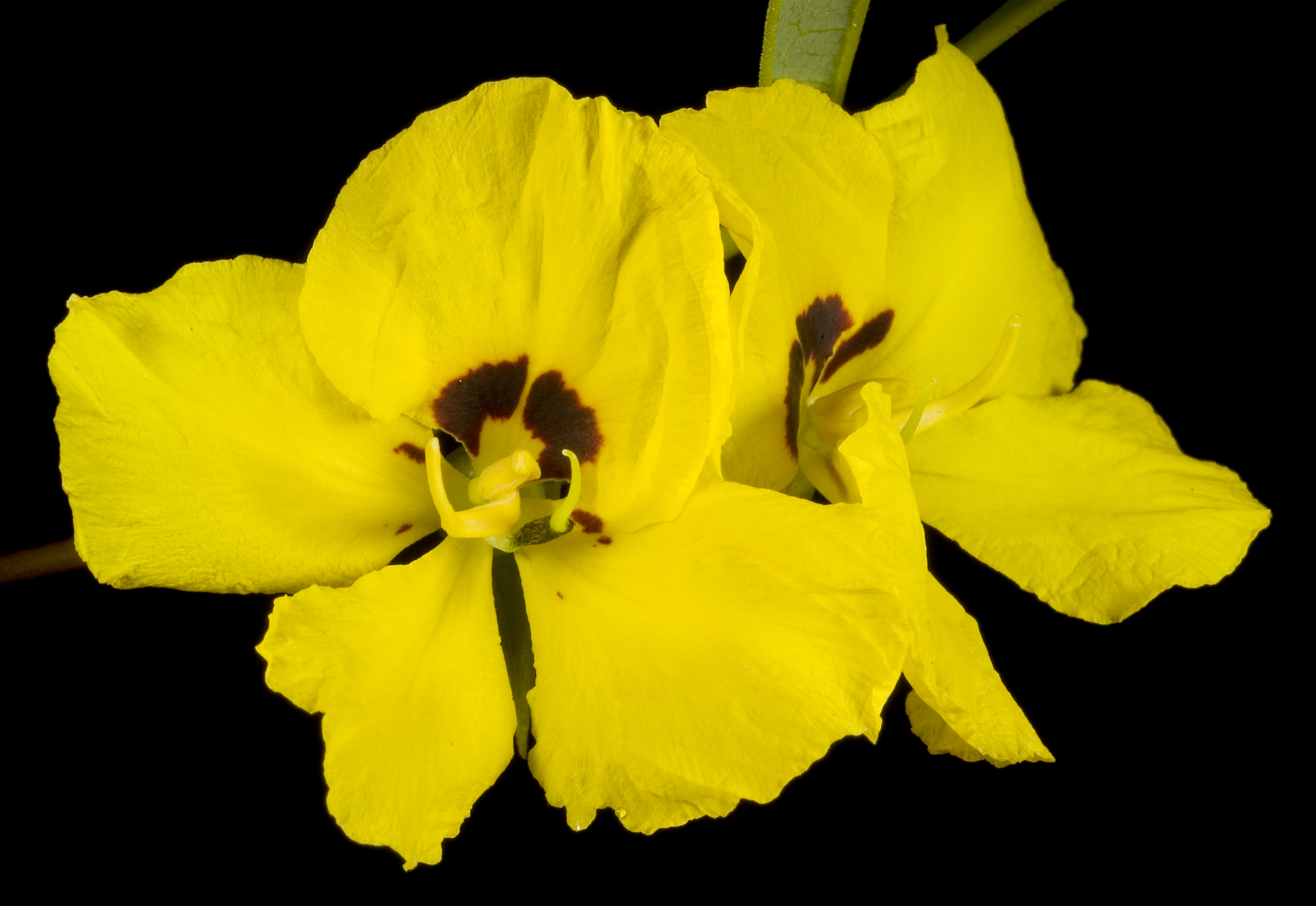 KRT3400